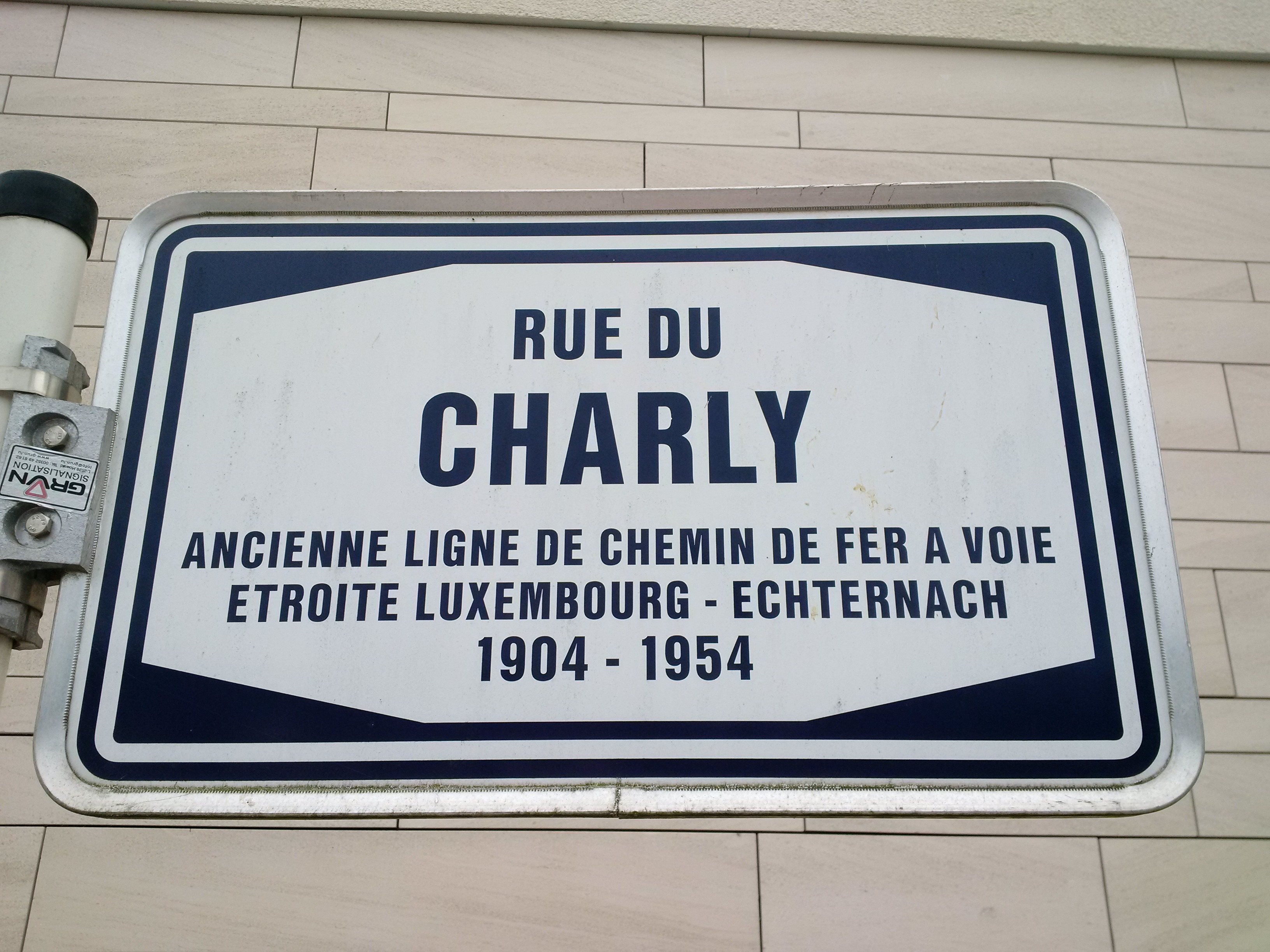 Stroosseschëld an der Stad Lëtzebuerg - "Rue du Charly" als Erënnerung un d'Schmuelspurbunn vun der Eisebunnslinn déi vun der Stad Lëtzebuerg op Iechternach goung.